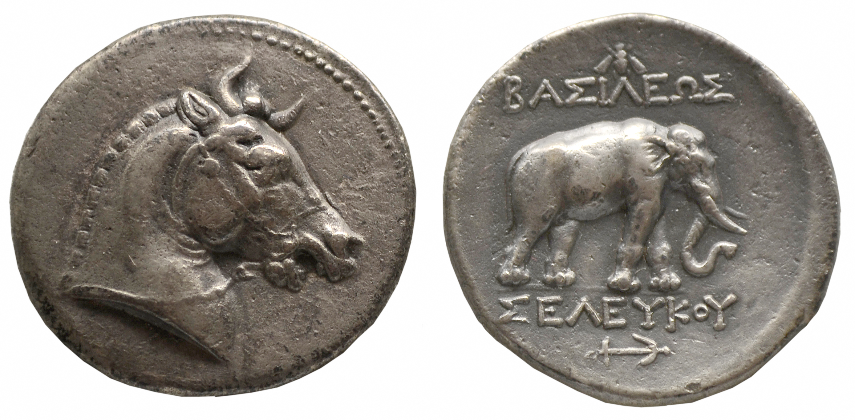 Berlin Pergamonmuseum, Tetradrachme Seleukos' I, Silber, Pergamon, 281-280 v.u.Z